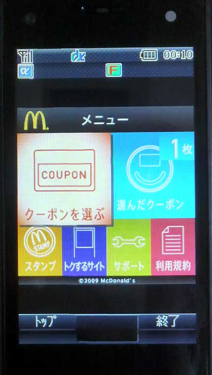 NTTドコモの携帯電話iアプリとオサイフケータイと連携した、マクドナルドトクするクーポンの画面